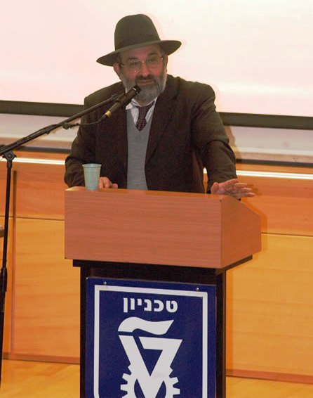 תמונה של הרב זייני